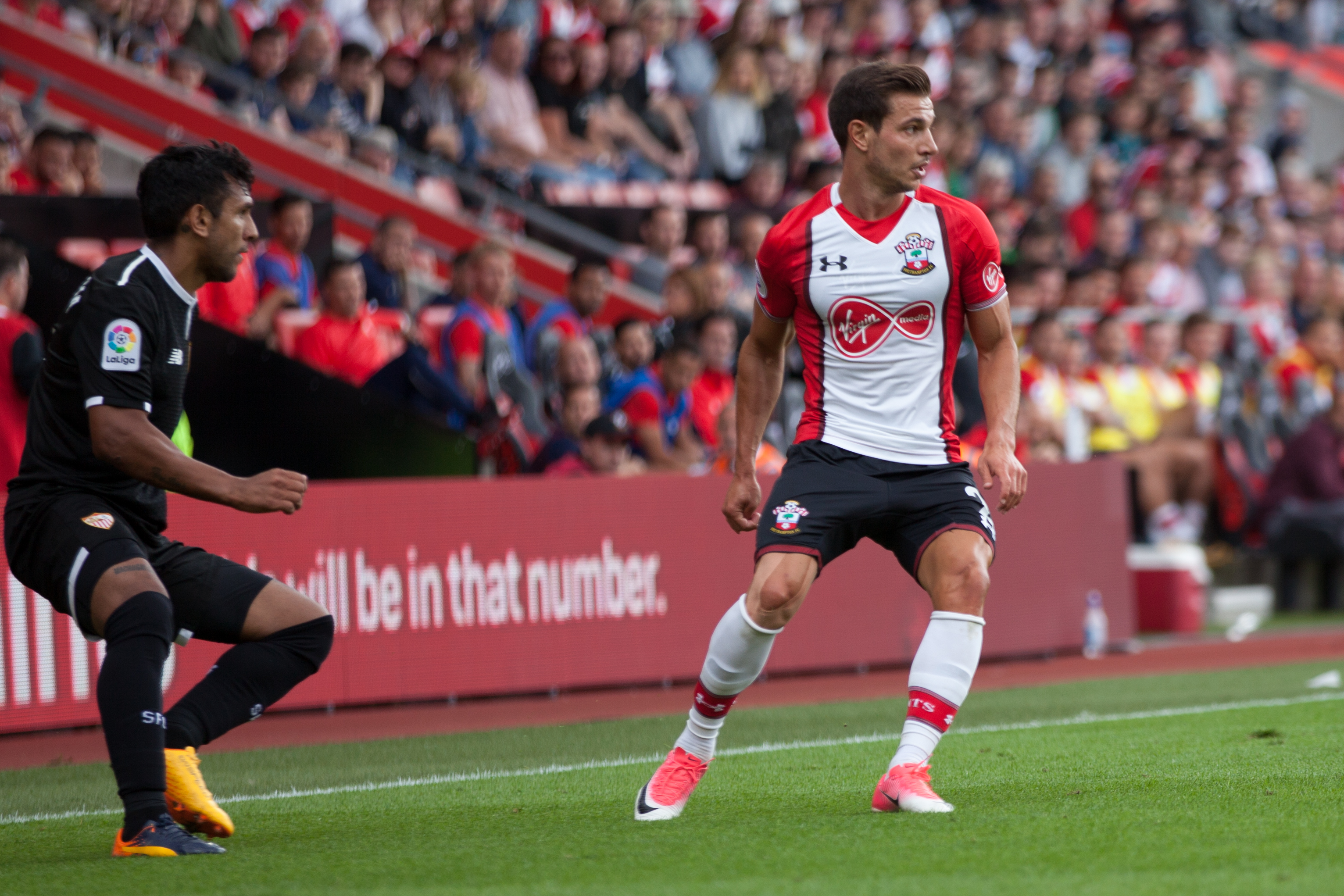 Image by Steve Hogg